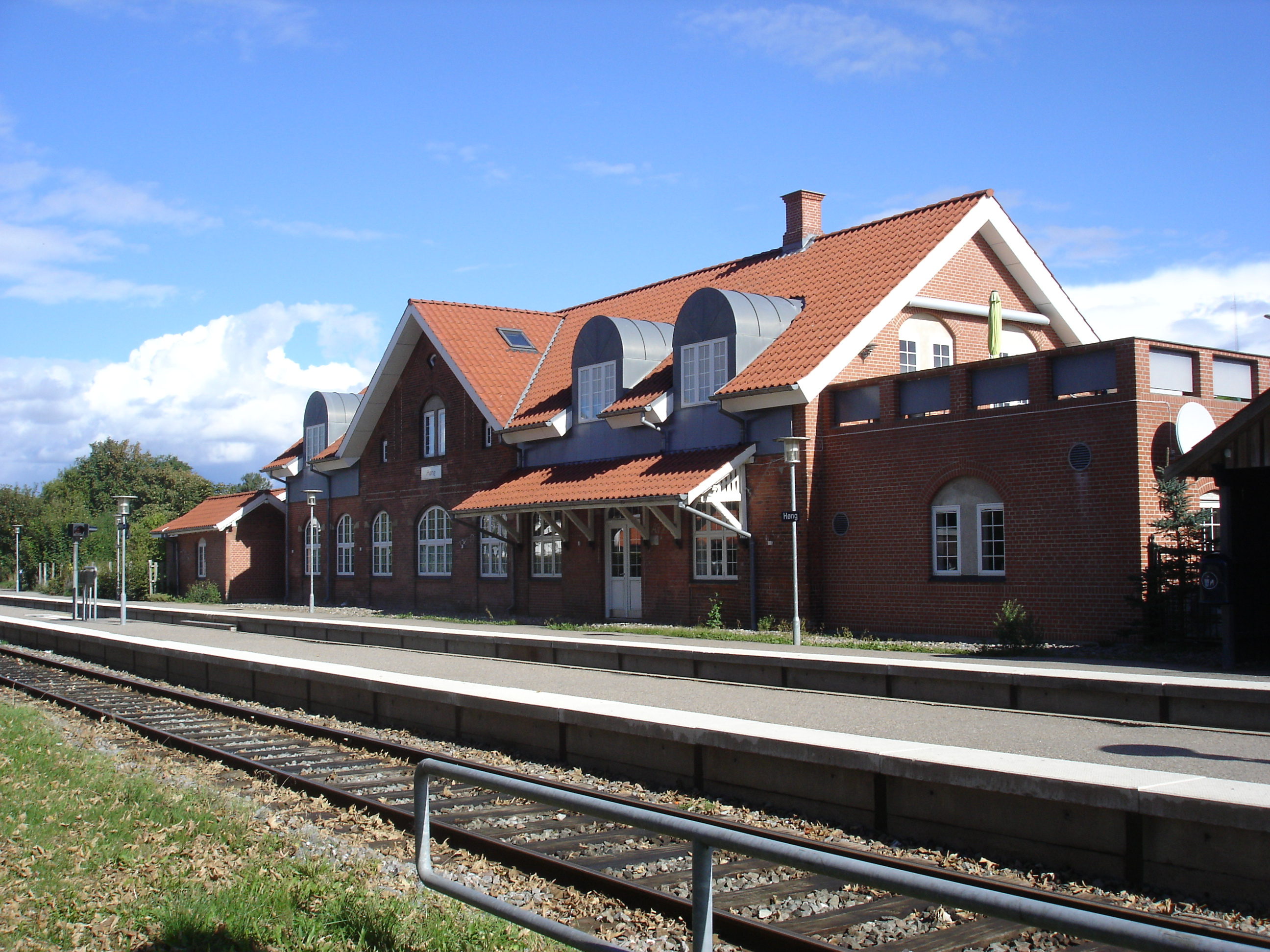 Høng Station fra sporsiden